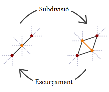 Subdivisió i escurçament d'un node present en un graf